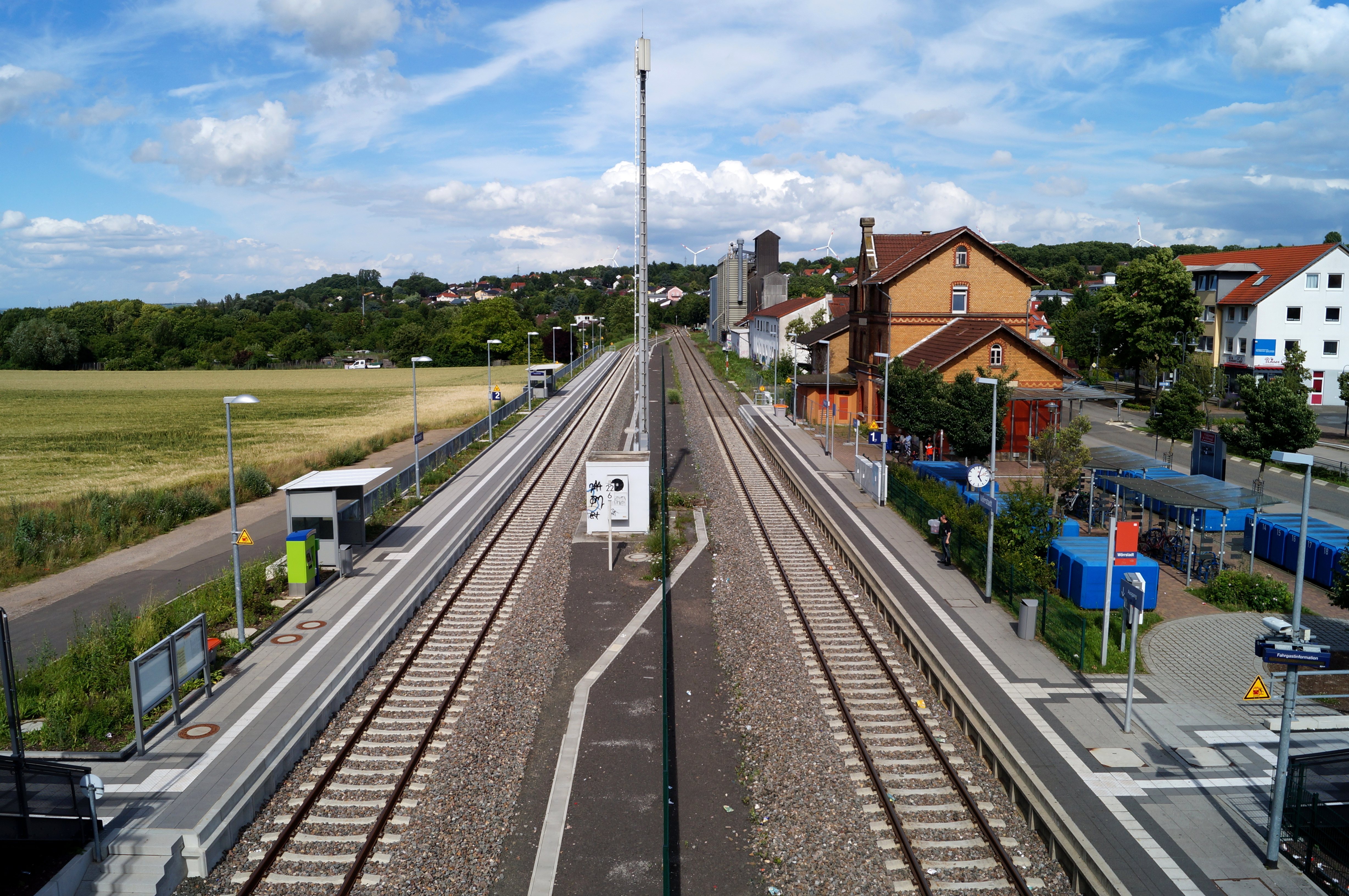 Die Bahnsteige des Bahnhofs Wörrstadt in Wörrstadt in Rheinland-Pfalz